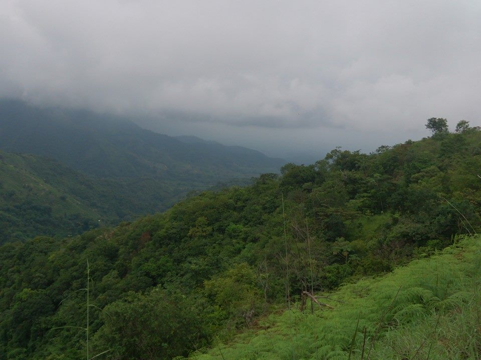 Parte alta serranía del perijà.